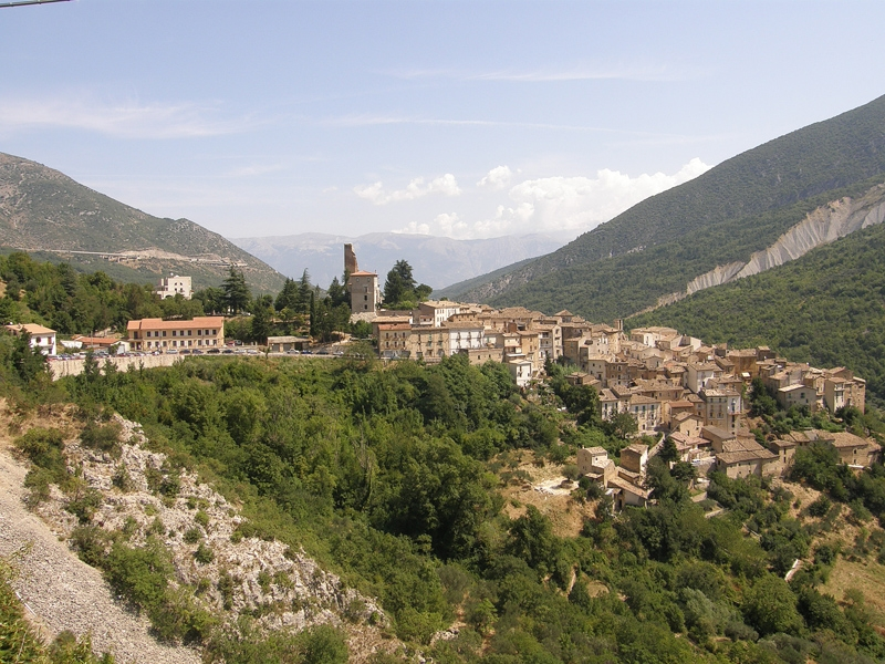 Anversa degli Abruzzi 2009